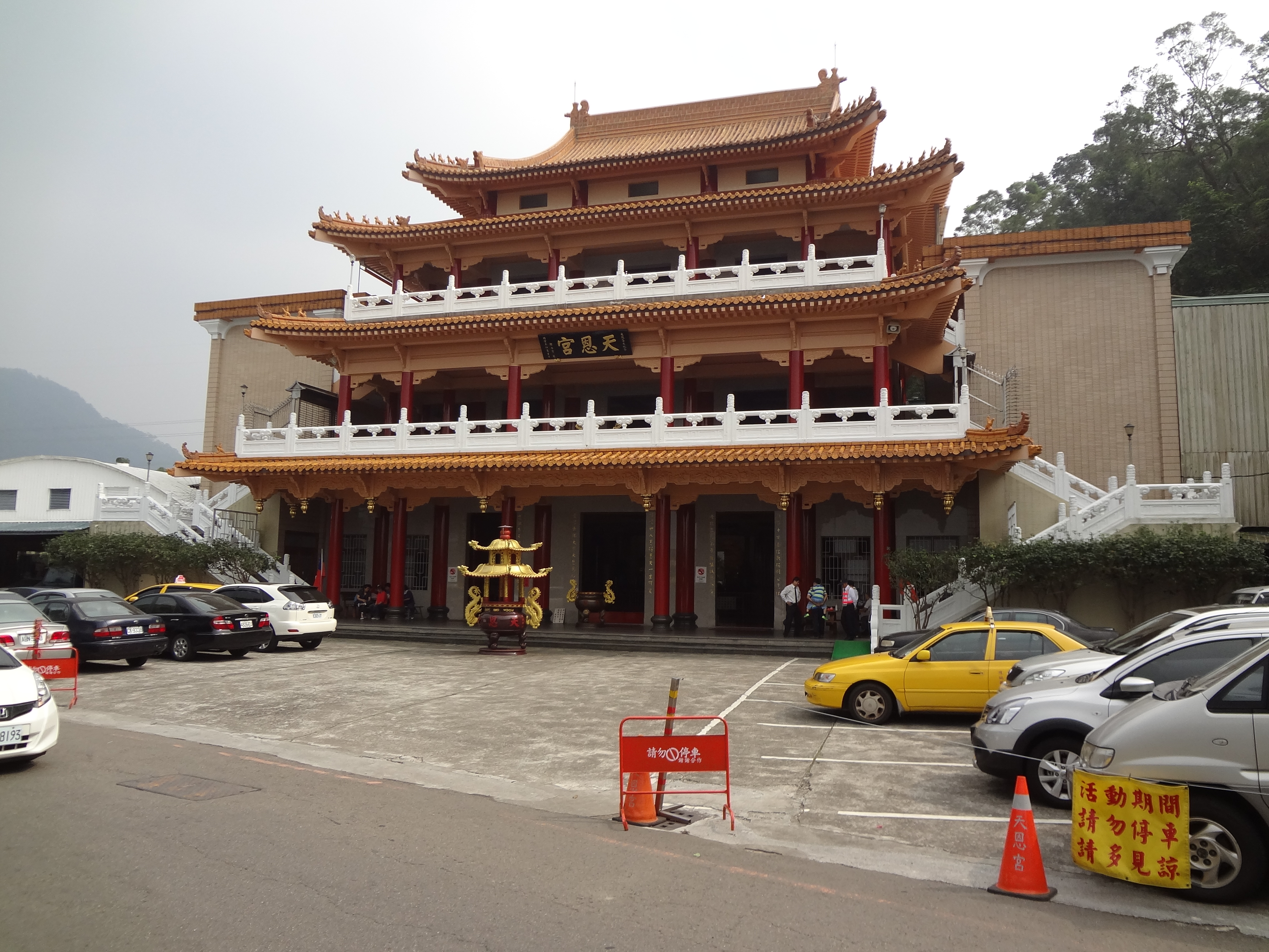 中文（台灣）: 貓空天恩宮，位於臺北市文山區指南路三段38巷37之2號。